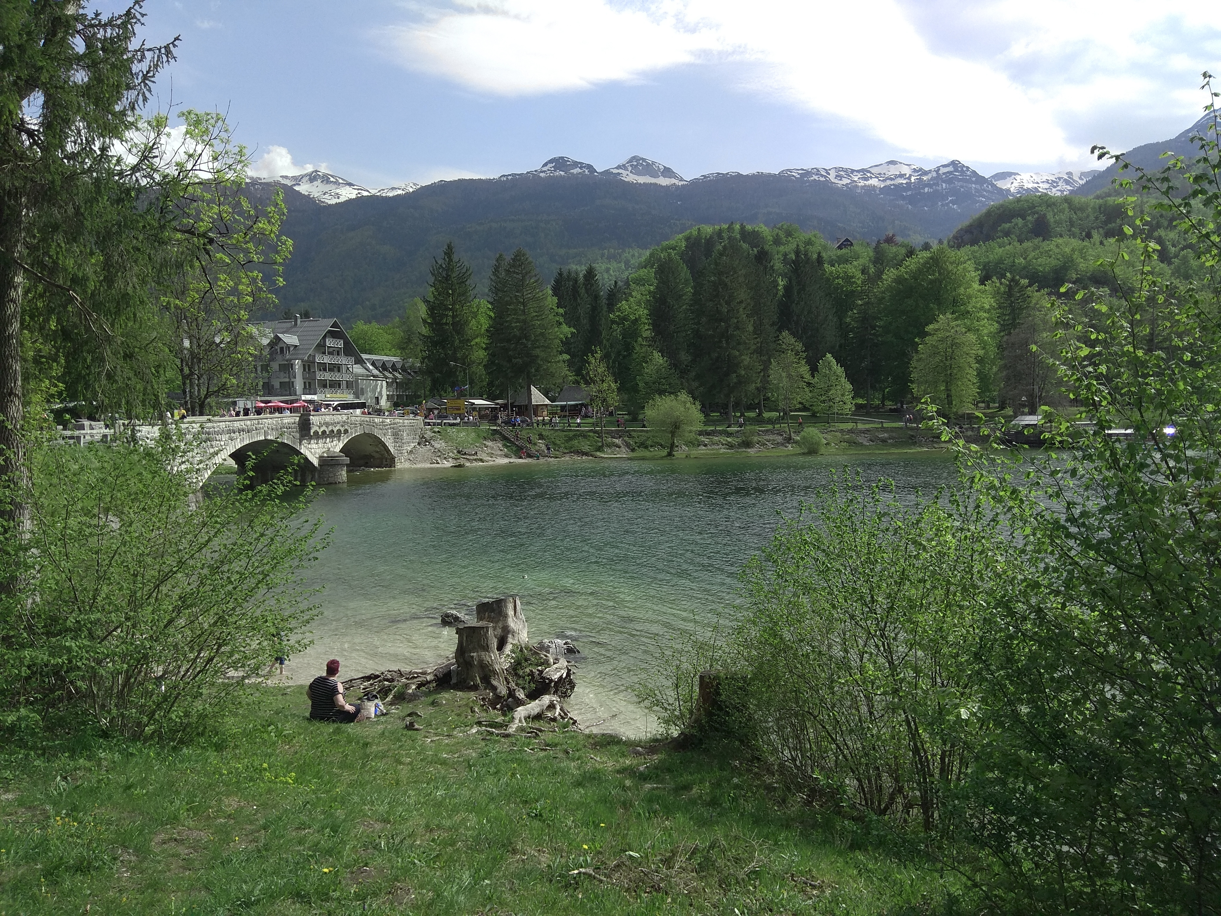 אגם בוהין 2018